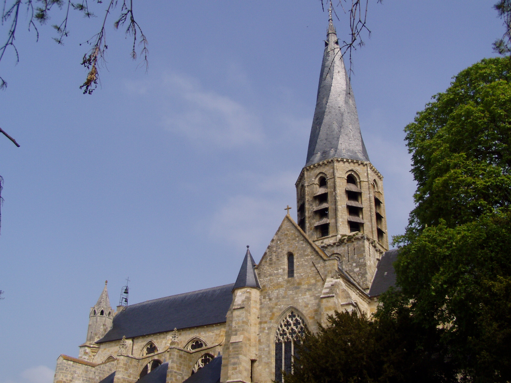 L'église de Puiseaux dans le Loiret